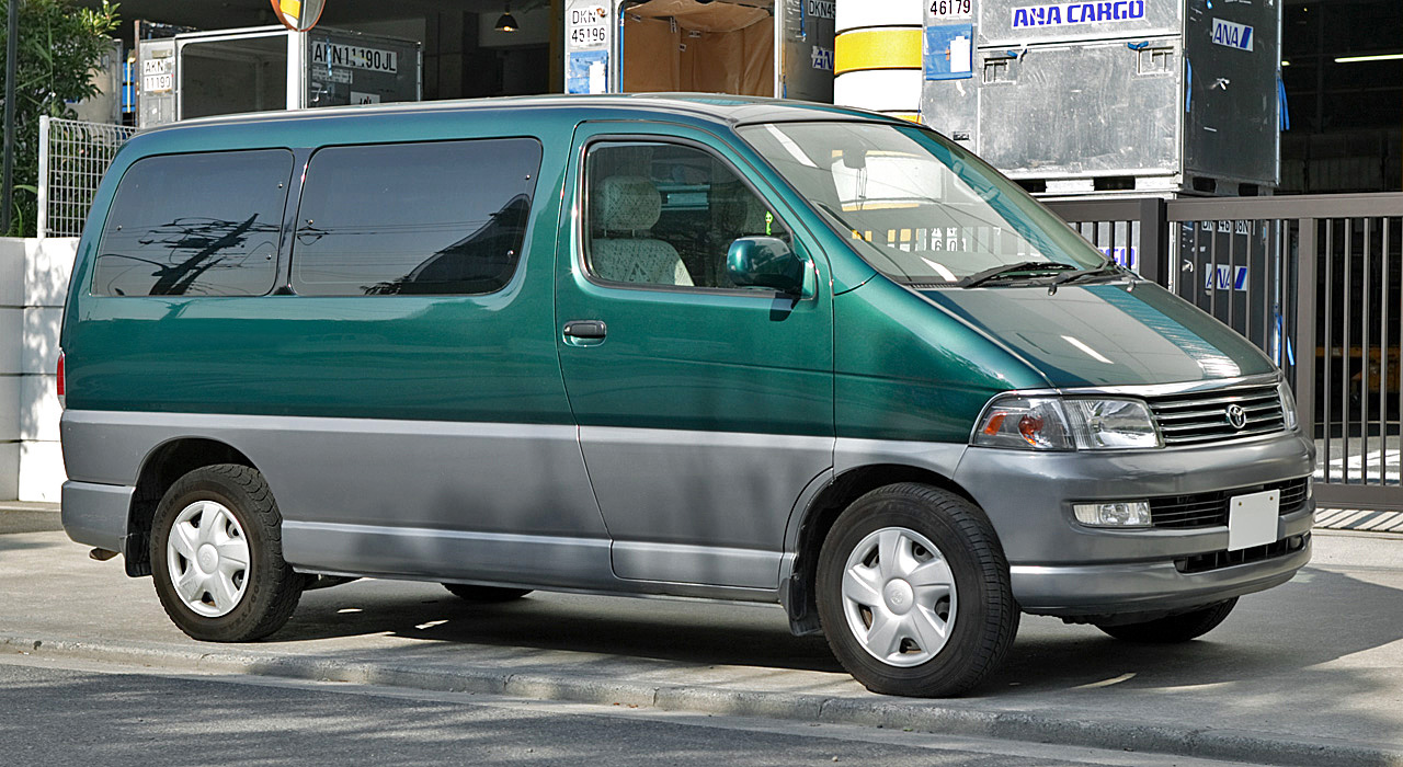 Toyota Hiace Regius